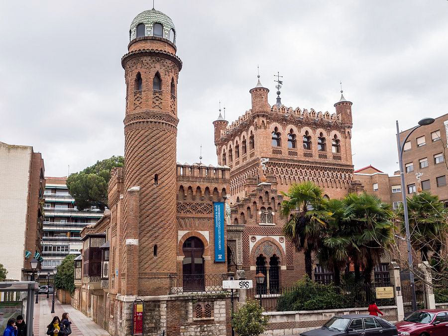 Palacete Laredo y Museo cisneriano.